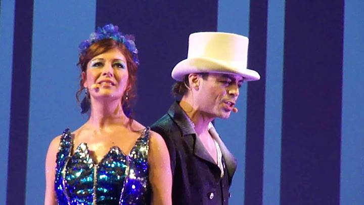 Sophie Delmas et Nuno Resende dans Pinocchio, le spectacle musical en 2013